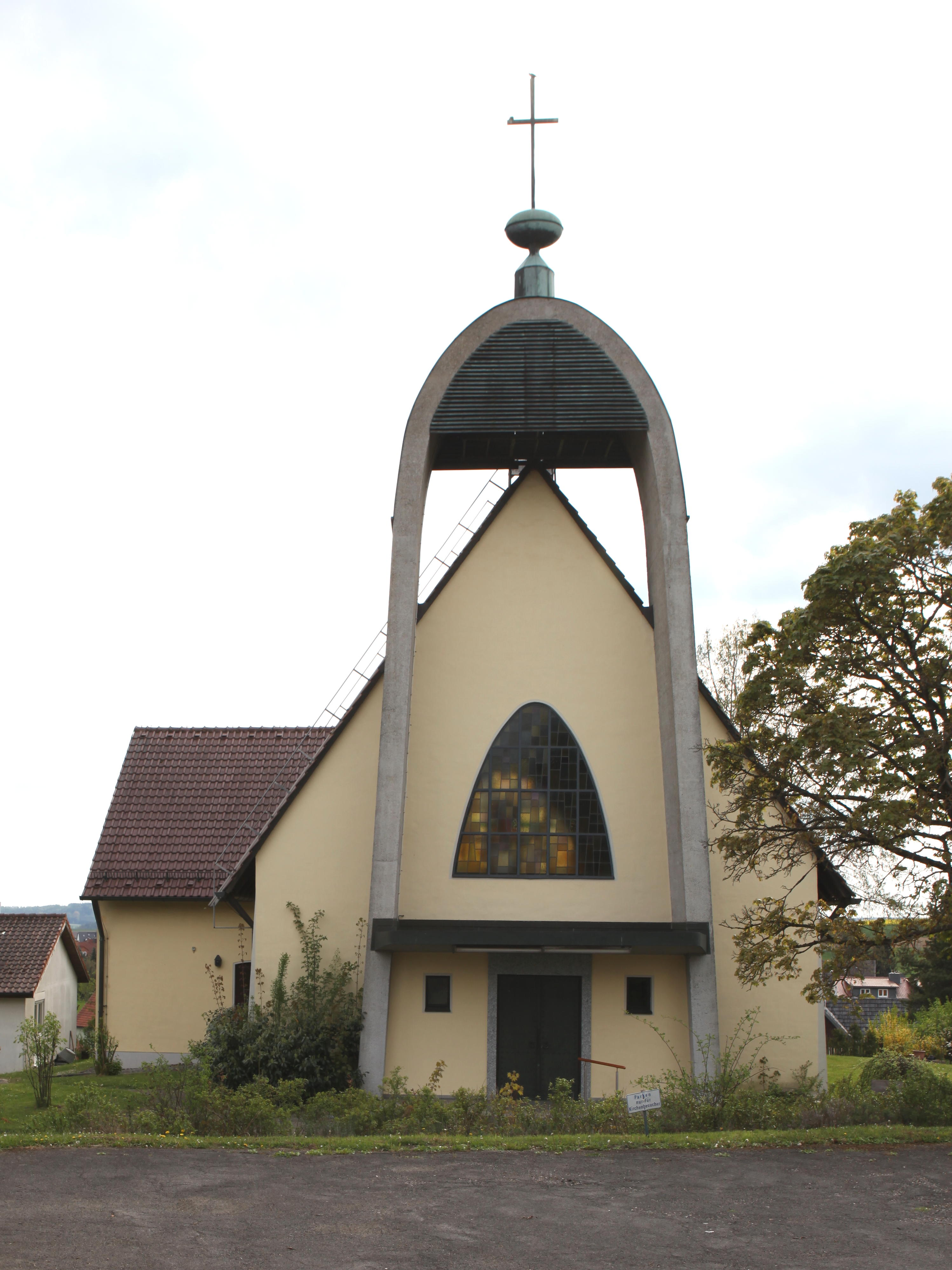 Oberlauter St. Bonifatius